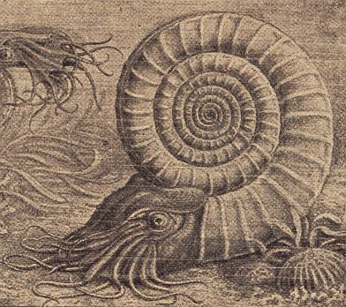 Historische Rekonstruktion eines Ammoniten, im Detail überholt, ergibt aber ein gutes Bild wie die Tiere grob aussahen. Bildquelle: Fraas: Handbuch des Petrefaktensammlers S. 167 von 1910.